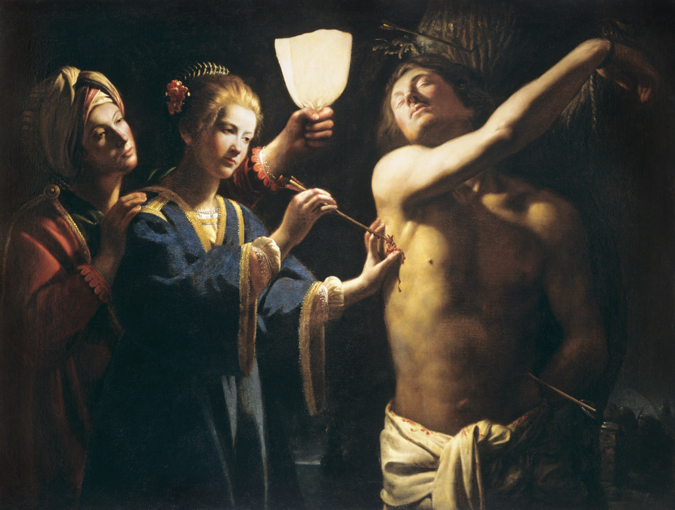 Anonyme caravagesque. Saint Sébastien soigné par Irène Musée des Beaux-Arts-mairie de Bordeaux